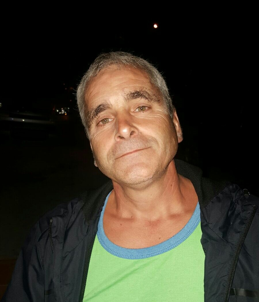 O Pinto de Herbón en agosto do 2016